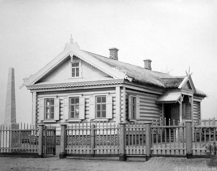 Кутузовская изба при возобновлении в 1887 году